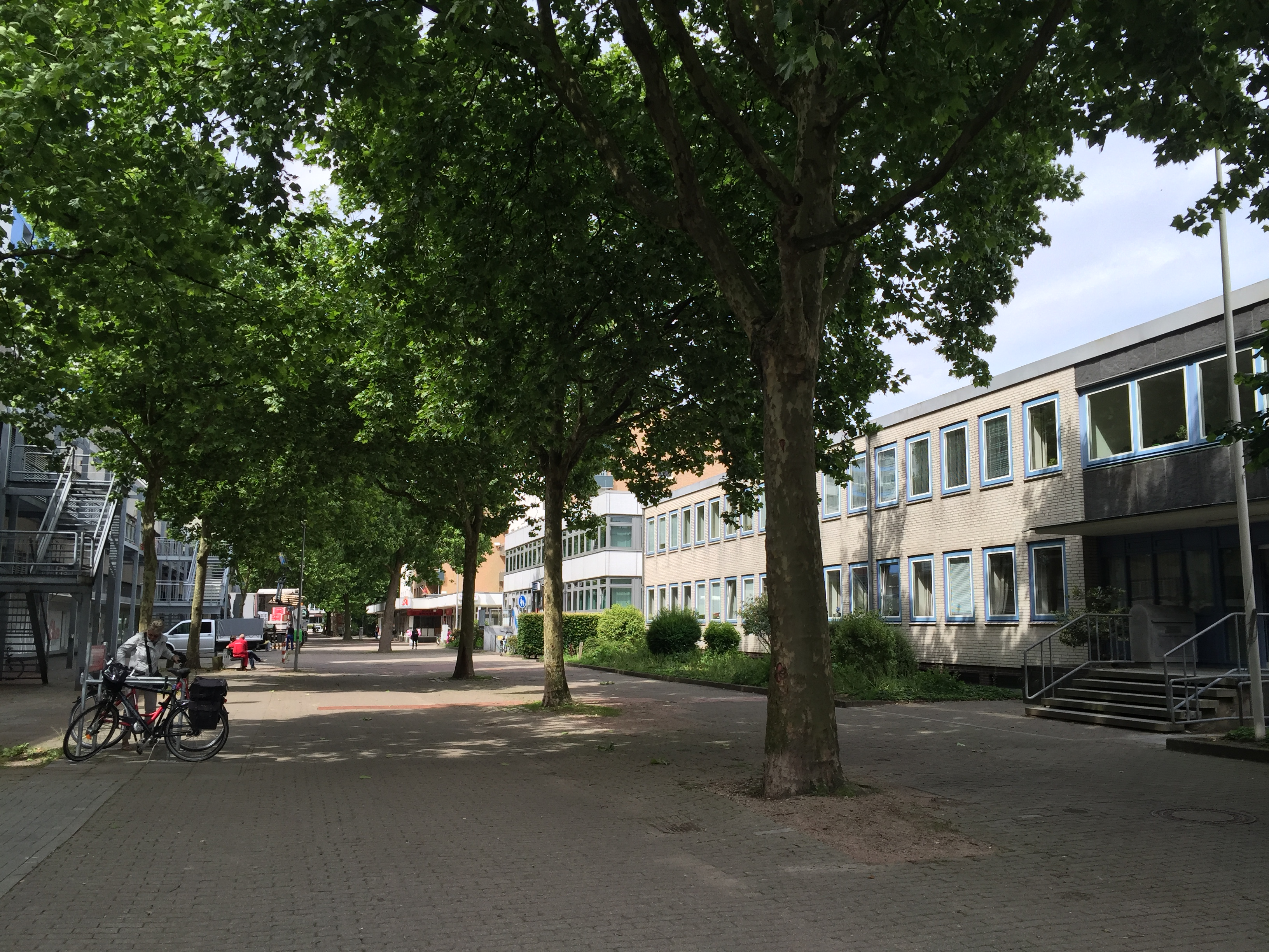 Fußgängerzone Europa-Allee in Norderstedt